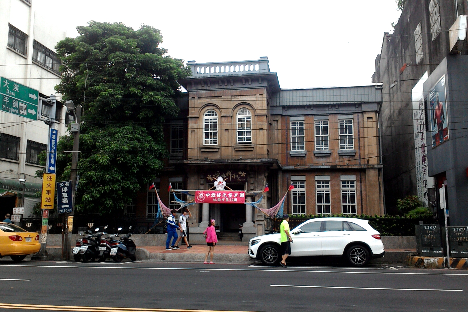 吳榮棣故居,桃園市中壢區中榮里